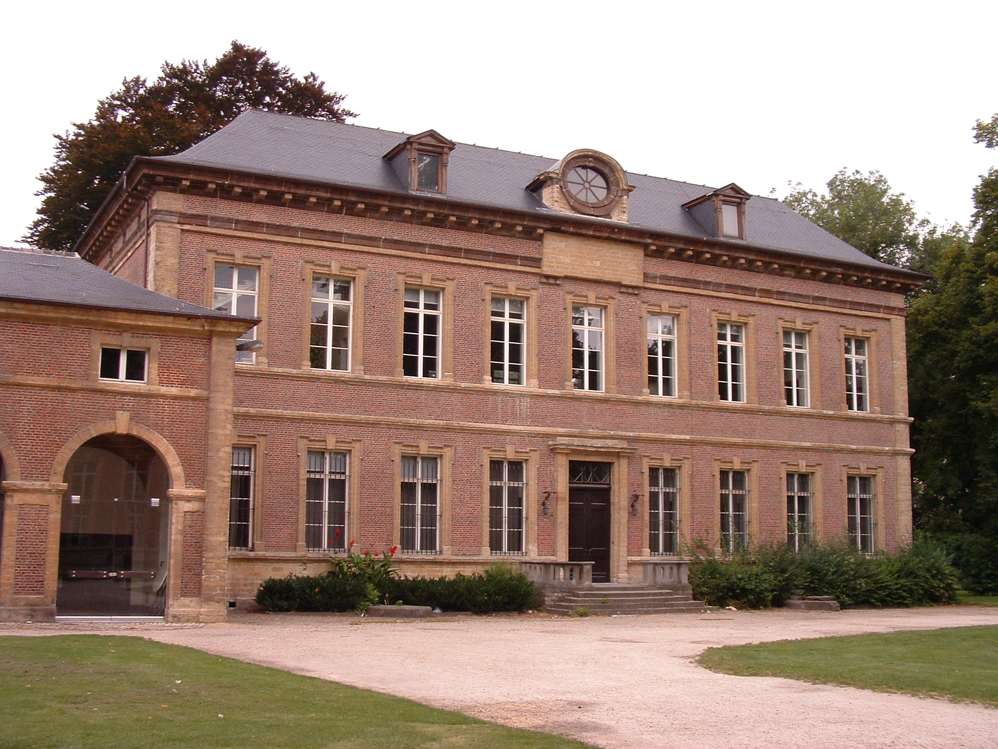 Foto: G. Debognies (21/07/05)